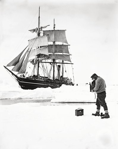 Self-portrait